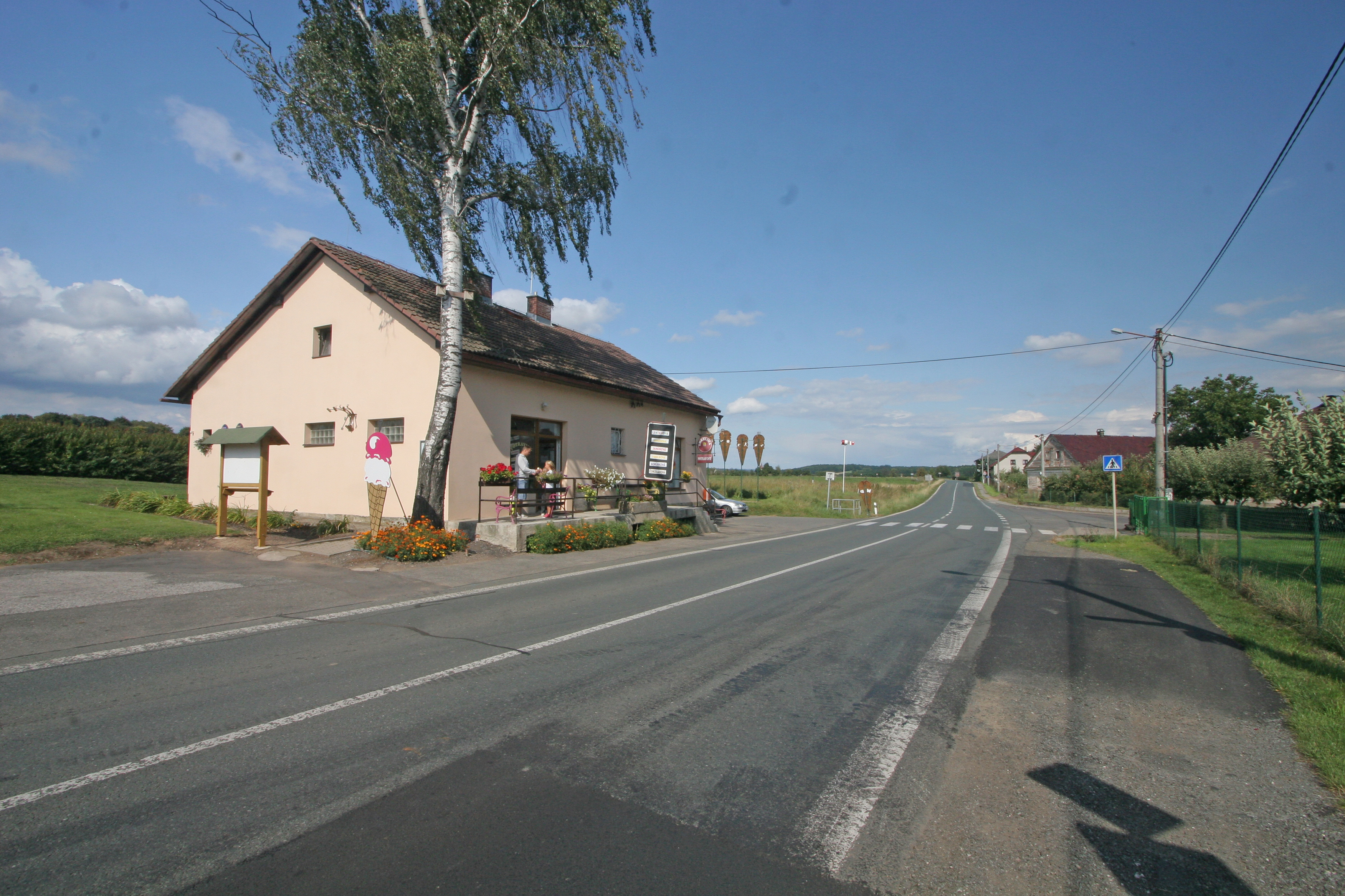 Hořenice prodejna